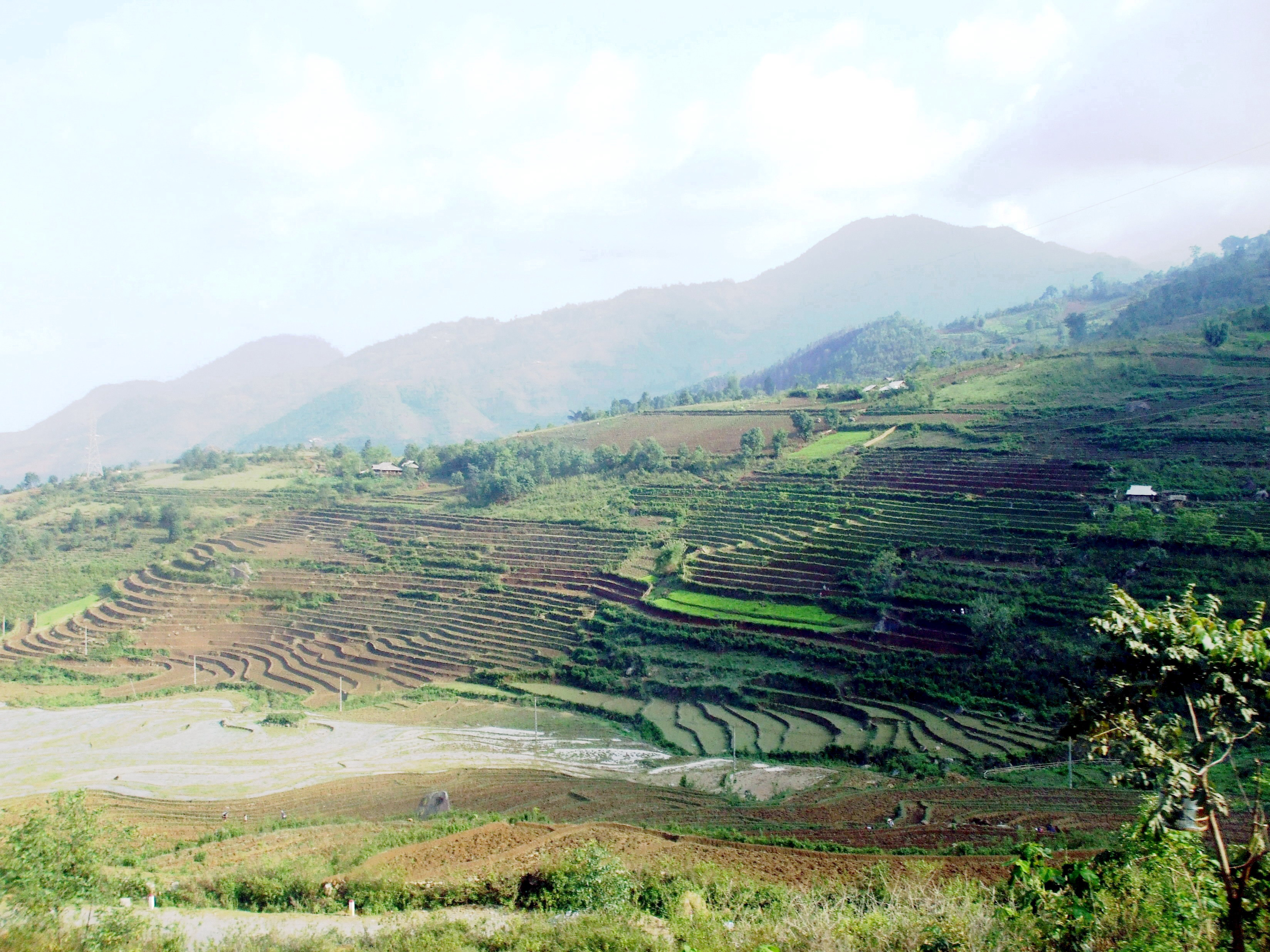 Phong cảnh trên tuyến Quốc lộ 70 dẫn đến Lao Cai, Việt Nam.